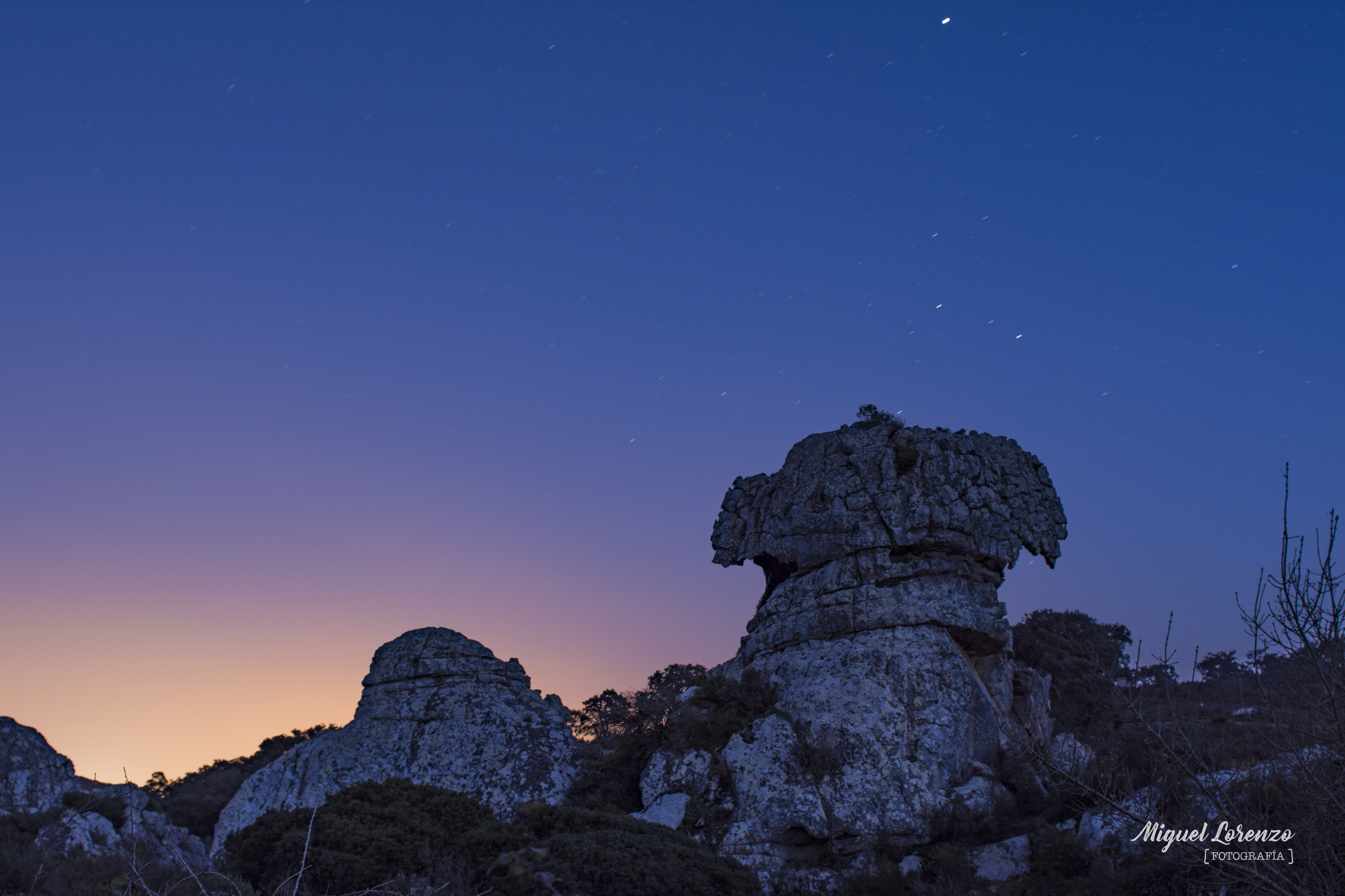 Atardecer en la Montera del Torero, Los Barrios